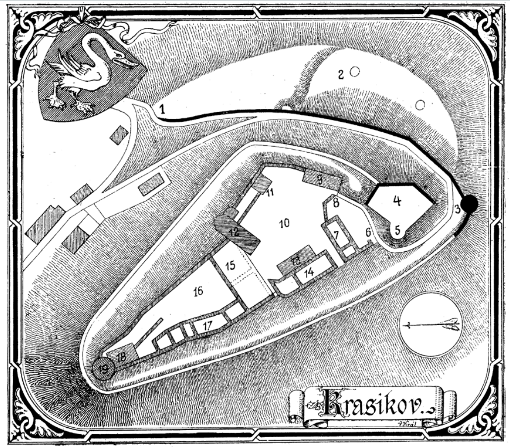 Křivoklát – půdorys hradu od Vojtěcha Krále z Dobré Vody publikovaný roku 1905; popis: 1 – cesta s podélným valem, 2 – prohlubně, 3 – věž, 4 – bašta, 5 – polookrouhlý výstupek bašty, 6 – brána, 7 – budovy (pivovar, sladovna, sklady), 8 – brána, 9 – byt kostelníka, 10 – předhradí, 11 – zvonice, 12 – kaple, 13 – dřevěná bouda, 14 – stáj, 15 – příkop, 16 – dvůr zadního hradu, 17 – dlouhá budova podél hradby, 18 – kůlna, 19 – velká věž